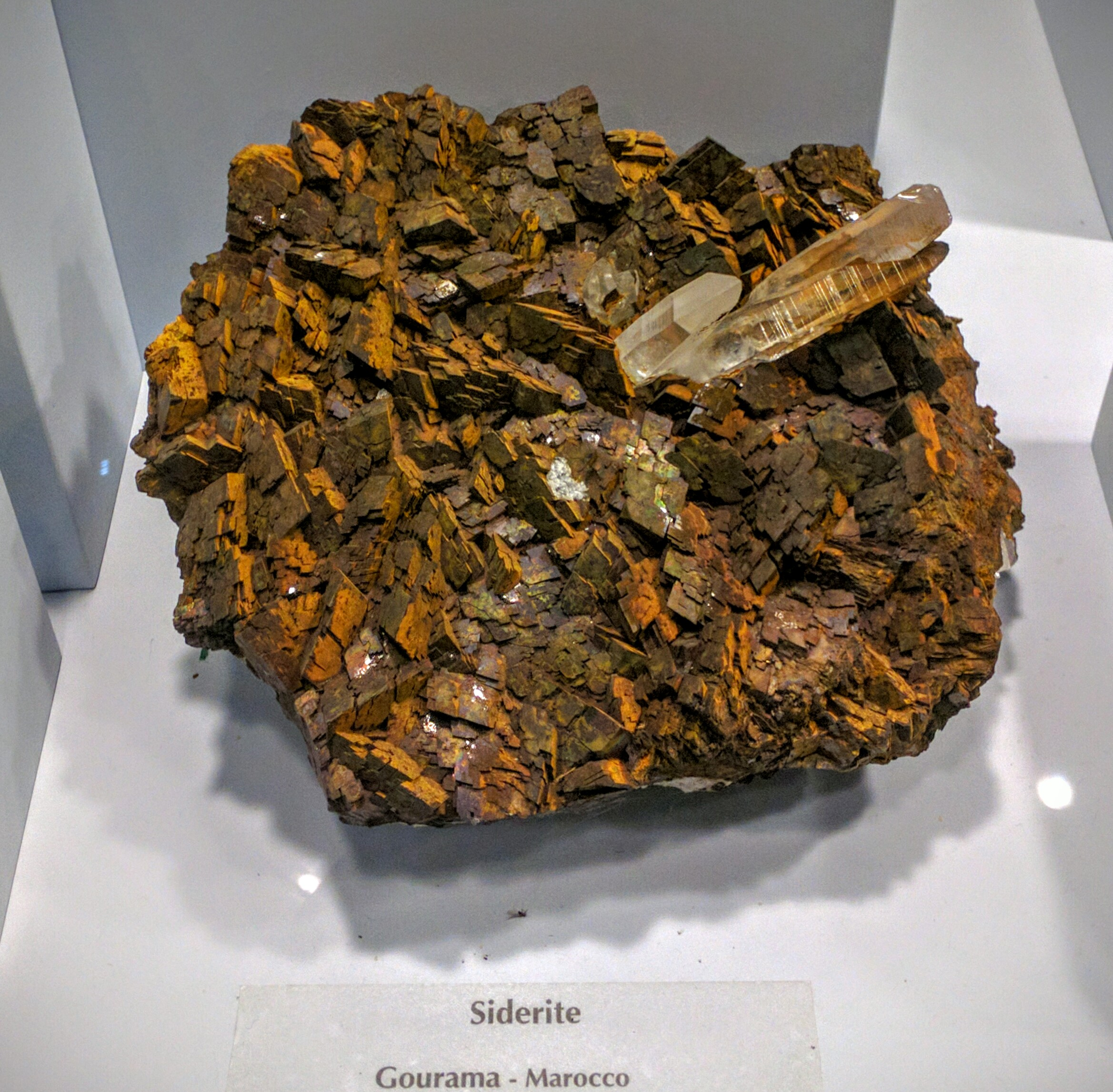 siderite